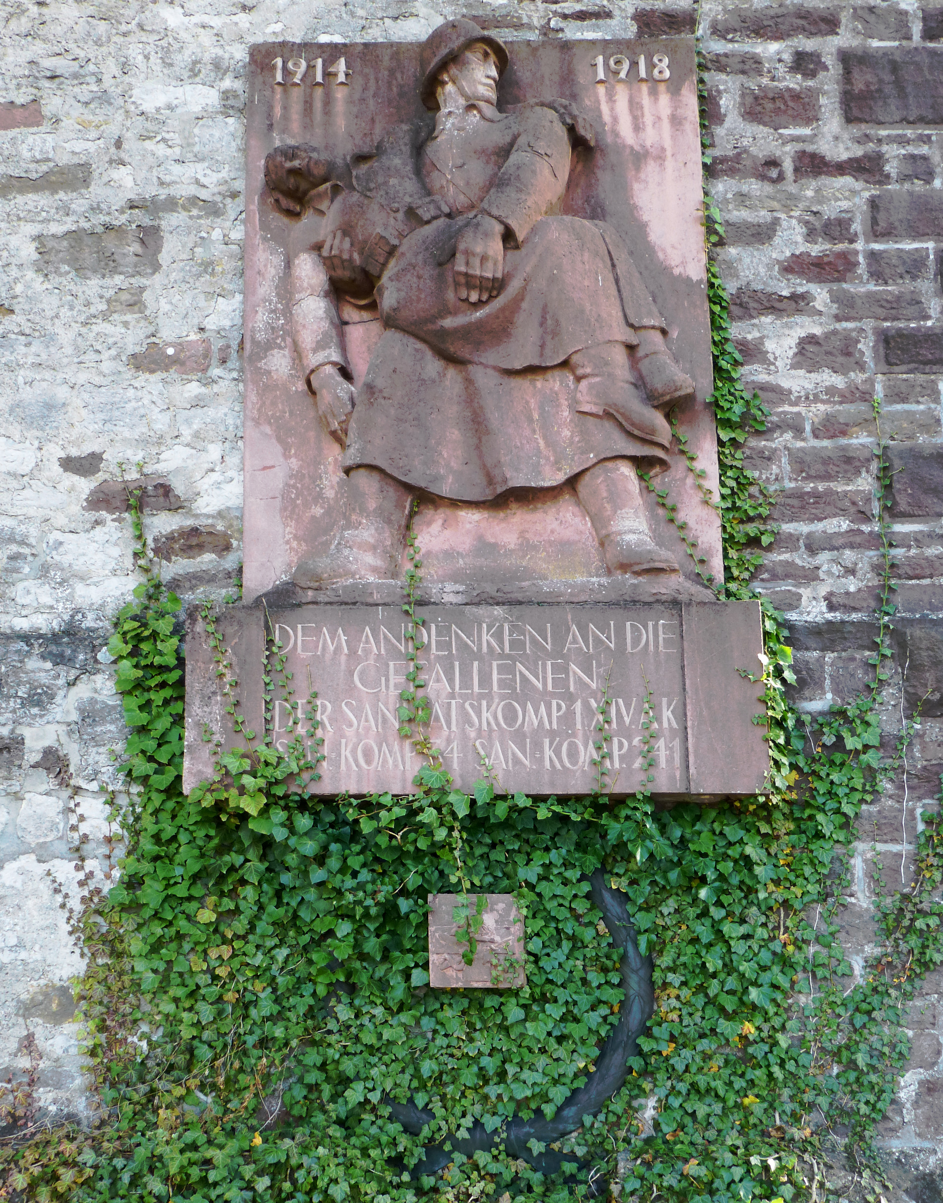 Gedenktafel am Turmberg in Karlsruhe an die Gefallenen von Sanitätskompanien im Ersten Weltkrieg